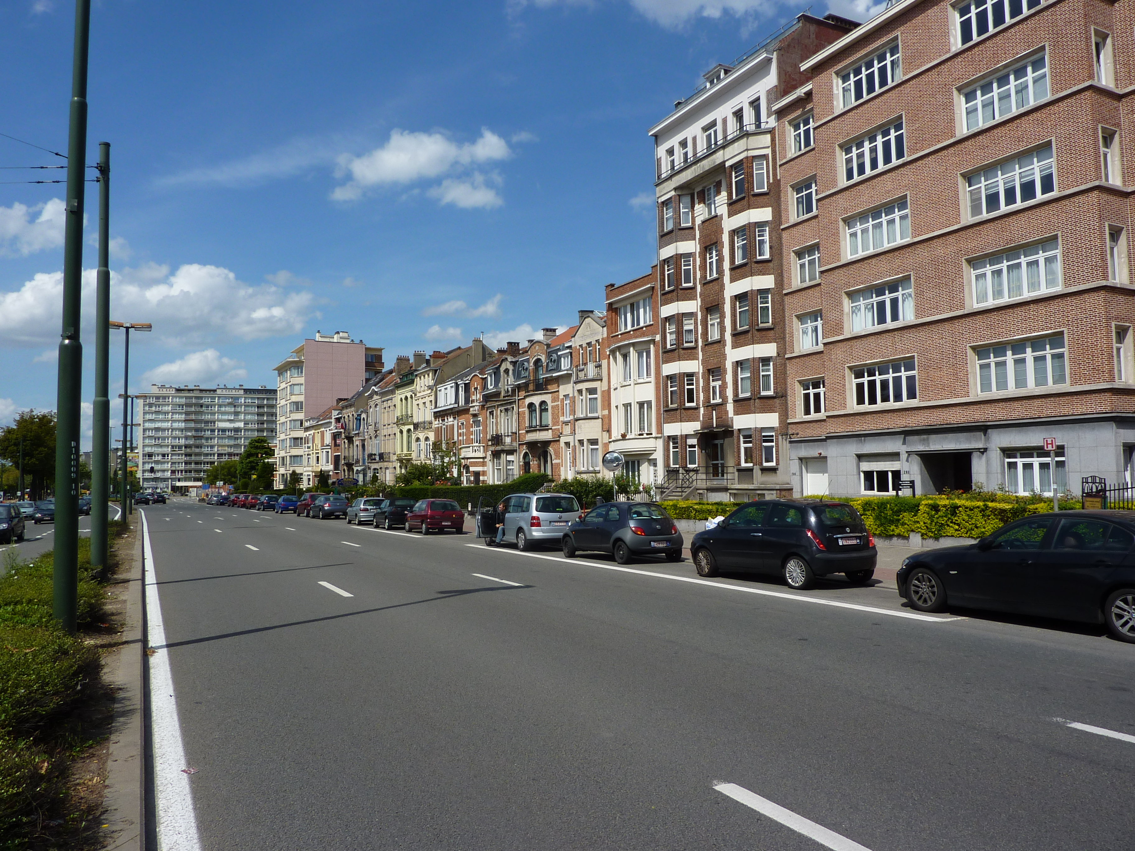 Le boulevard Général Wahis à Schaerbeek, Bruxelles, Belgique.